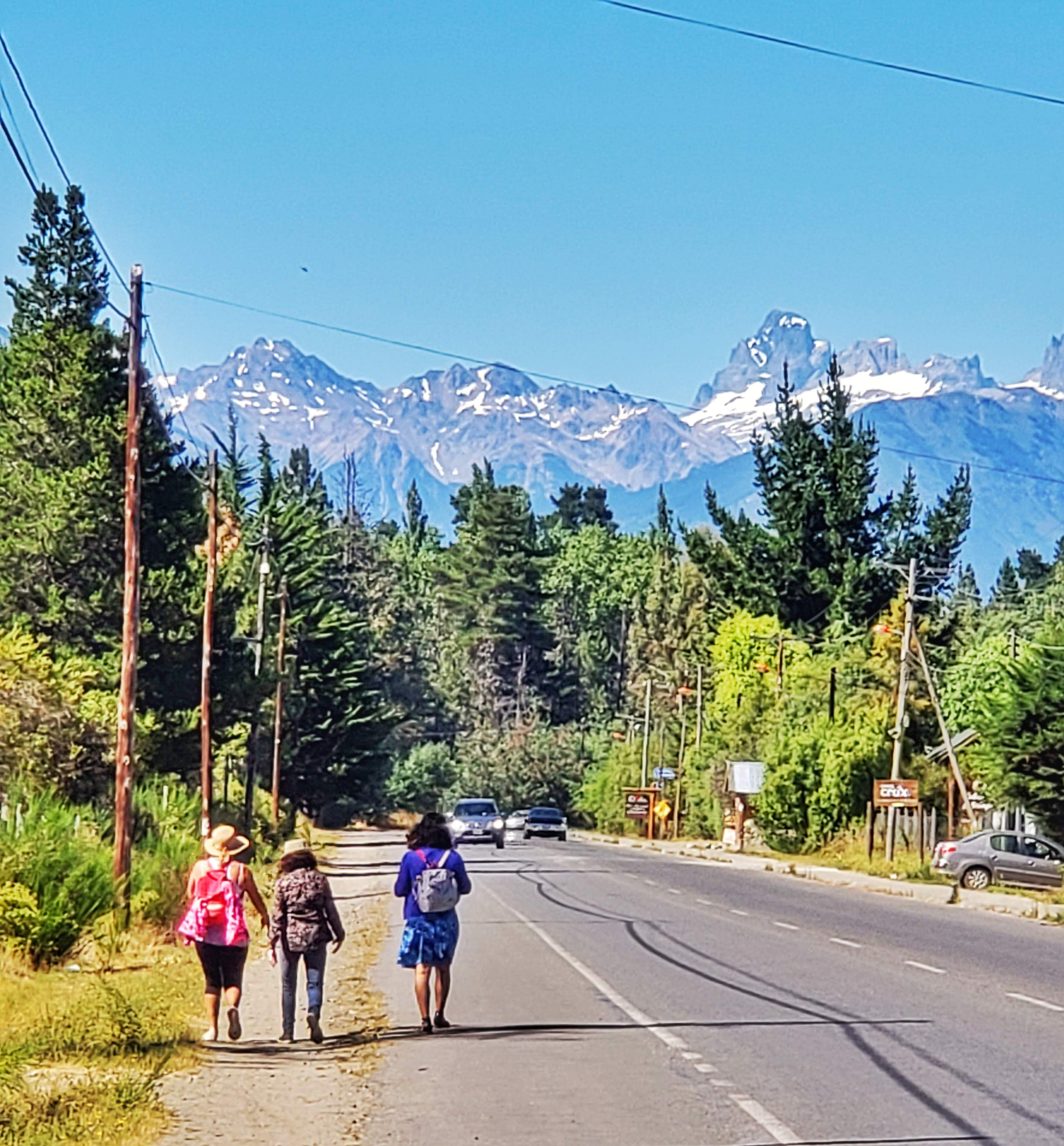 Lago Puelo